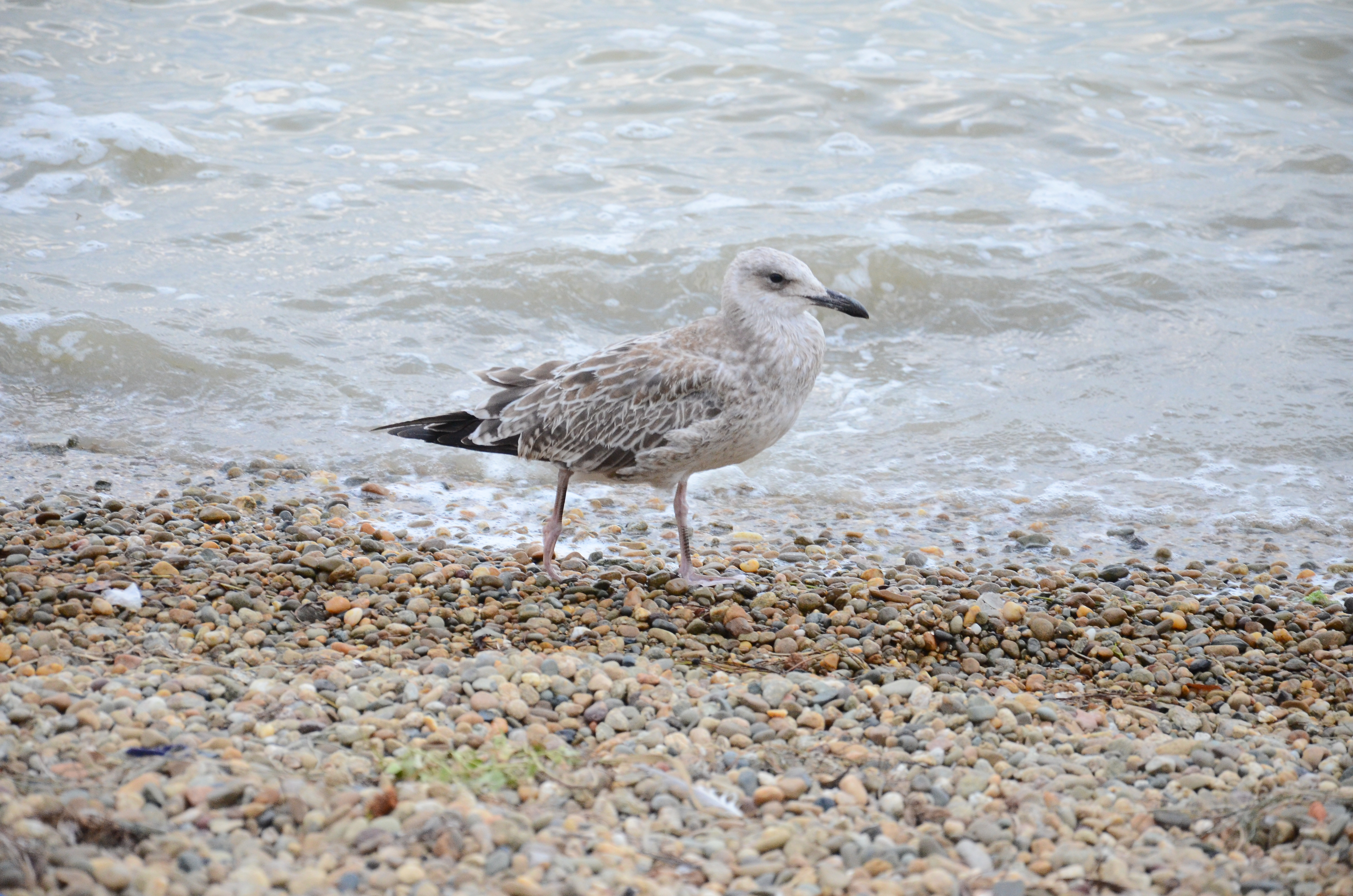 Ейск